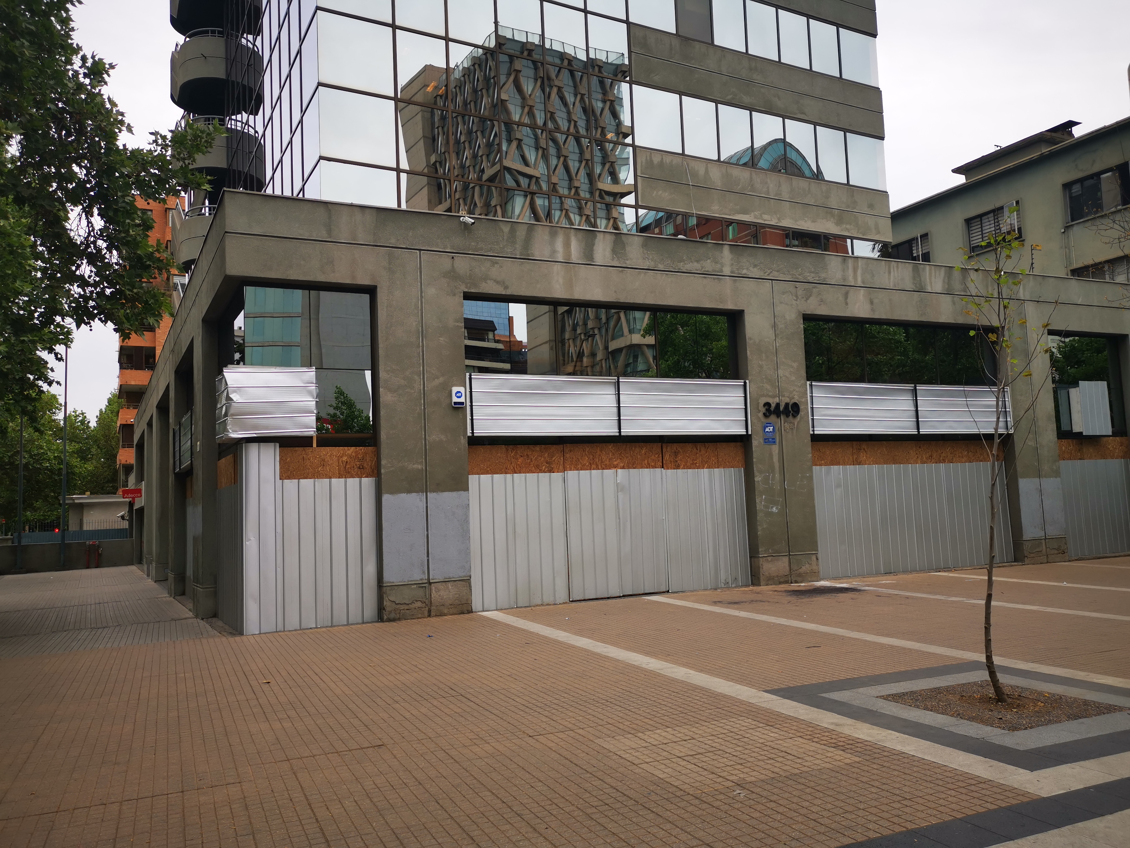 Protestas en Chile de 2019.